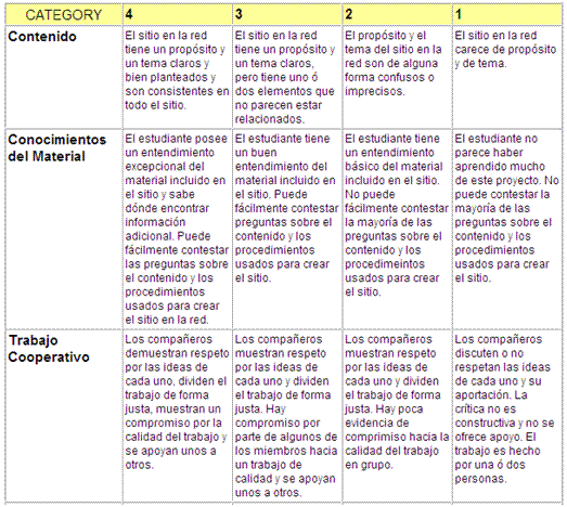 Rubrica de Evaluación